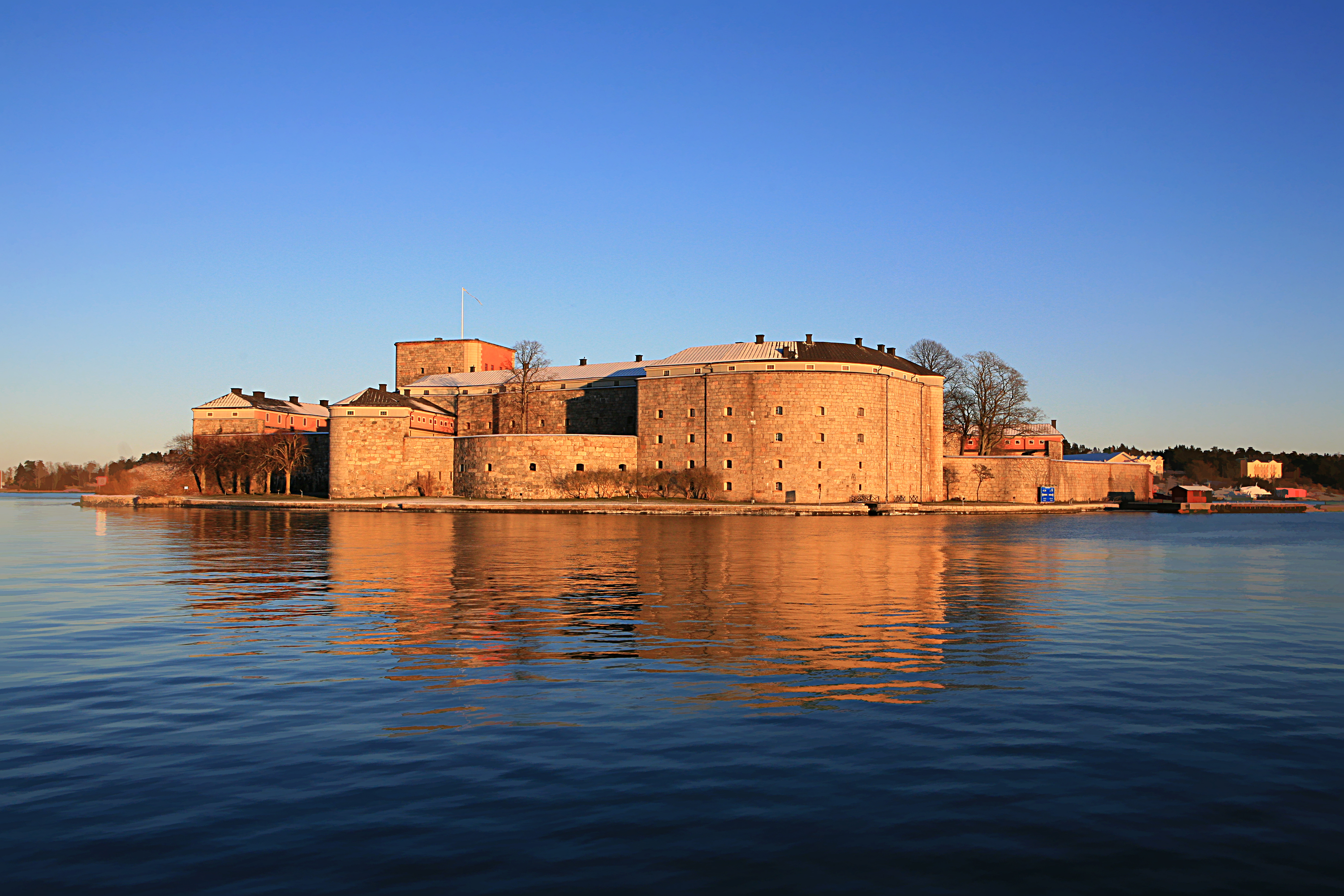 Vaxholm Sweden. Kastellet i vinter sol Kastellet, Vaxholm Castle